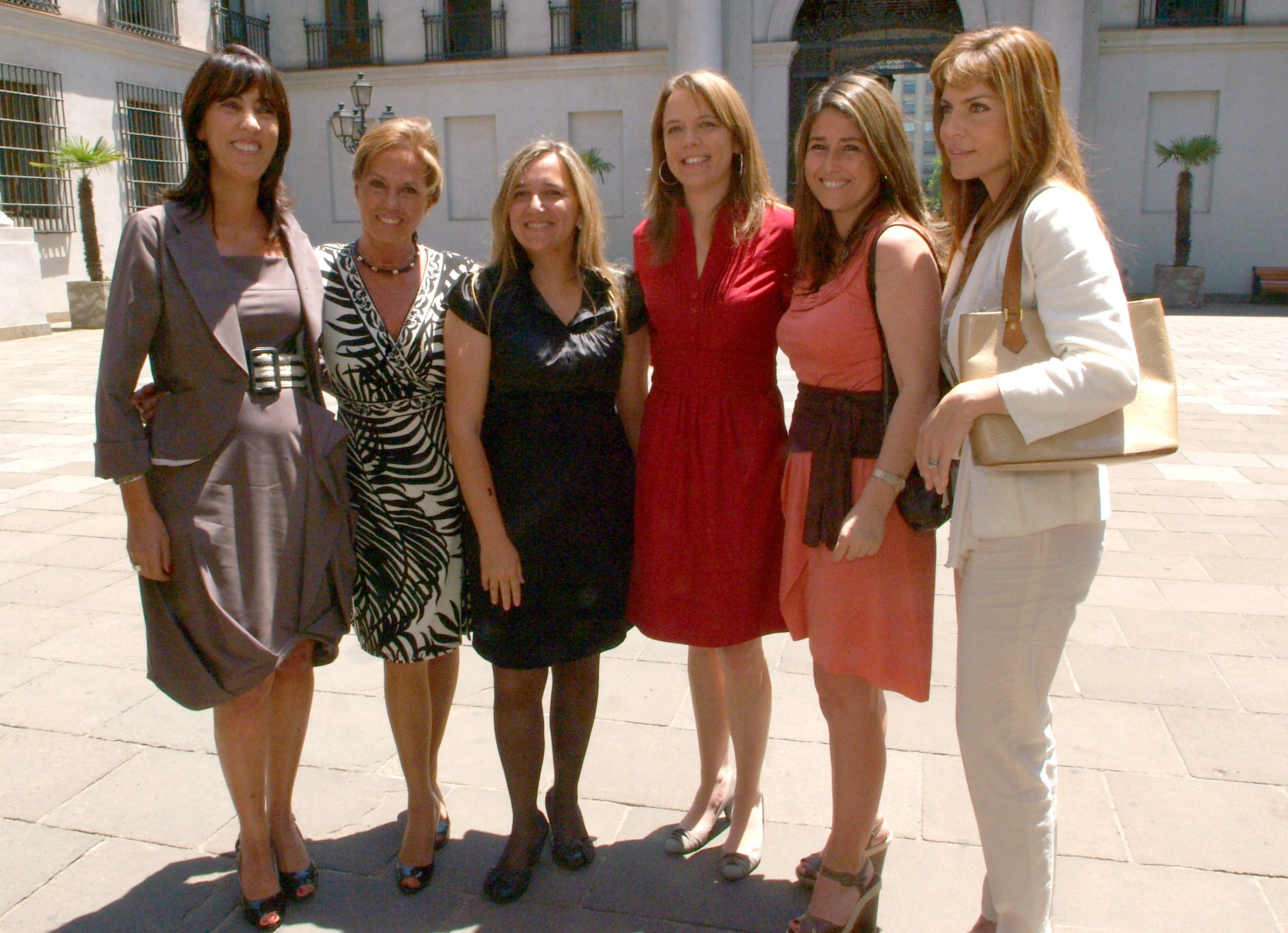 Ministra Secretaria General de Gobierno,Ena von Baer,juntas a parlamentarias de la Alianza.Palacio de la Moneda.